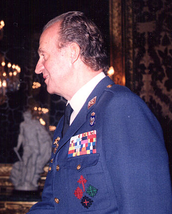 Juan Carlos I (imagen extraída del saludo al General Joaquín Sansano Samper)